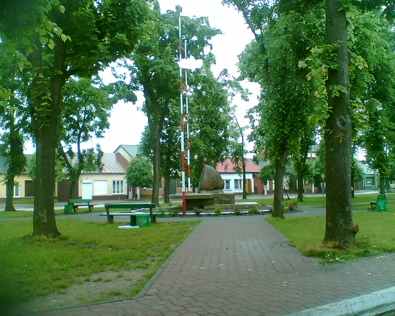 Pomnik w centrum Radoszyc